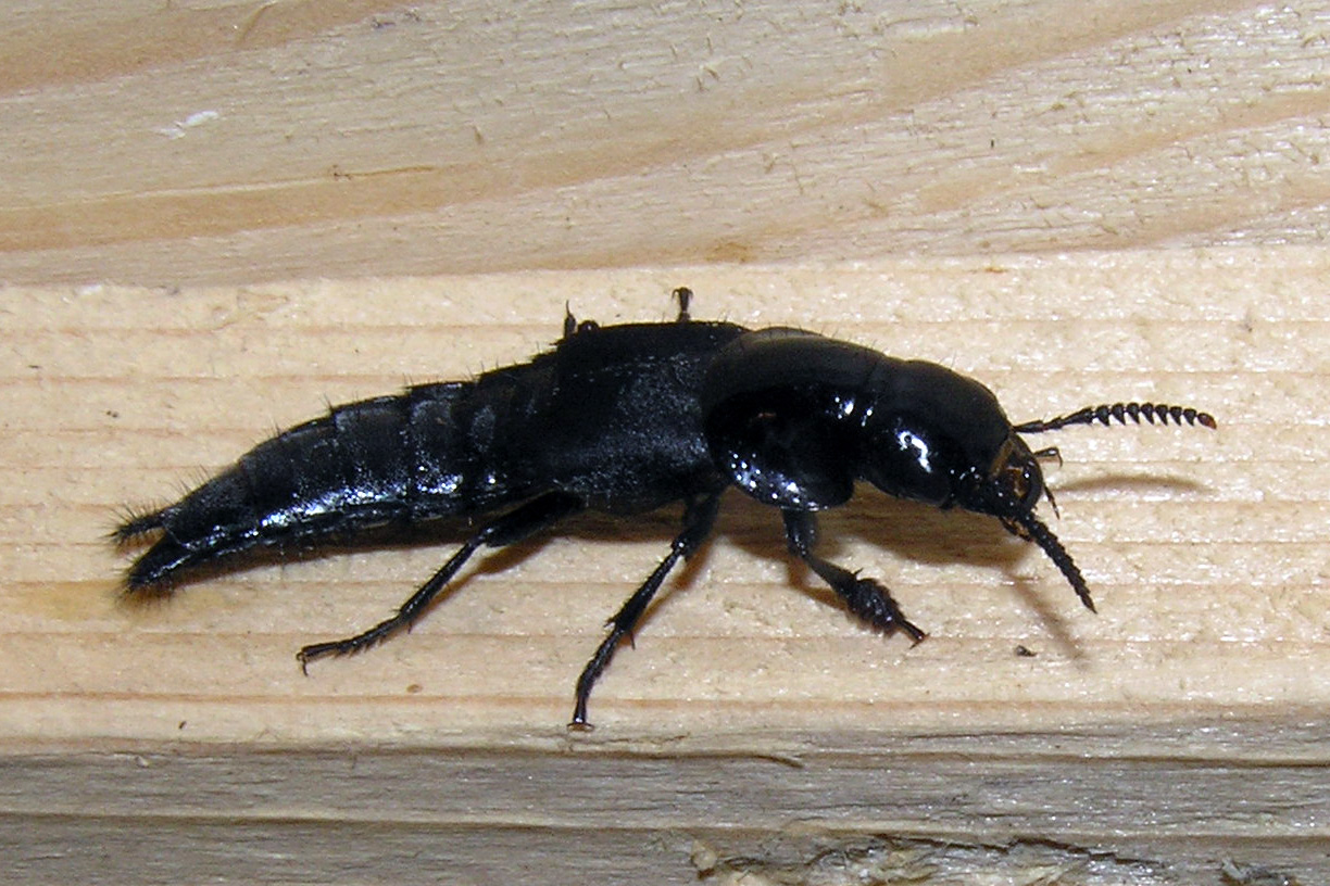 Dieser Hornissenkäfer Velleius dilatatus wurde von mir selbst, Dieter Kosmeier (alias "Hornisse" bei Wikipedia) im Juli 2005 fotgrafiert und wird hier zur Nutzung bei Wikipedia freigegeben. (Als Webmaster von habe ich einige sehr kurze Teile und Ausschnitte des dortigen Textes, der von mir stammt, in diversen Wikipedia-Artikeln untergebracht. Es ist also KEINE Urheberrechtsverletzung, das ich MEINE Text tlw. in Wikipedia kopiert habe! source: Benutzer:Hornisse) Bildbeschreibung